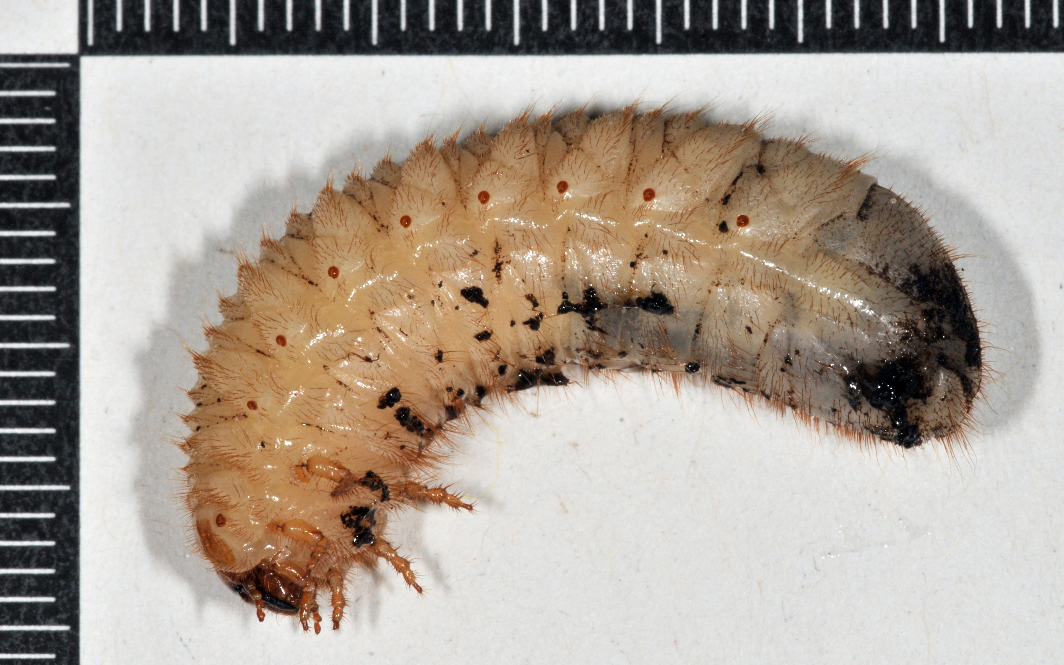 Cetonia aurata Larve (Engerling), Wiesbaden, Hessen, Deutschland